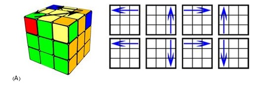 گام